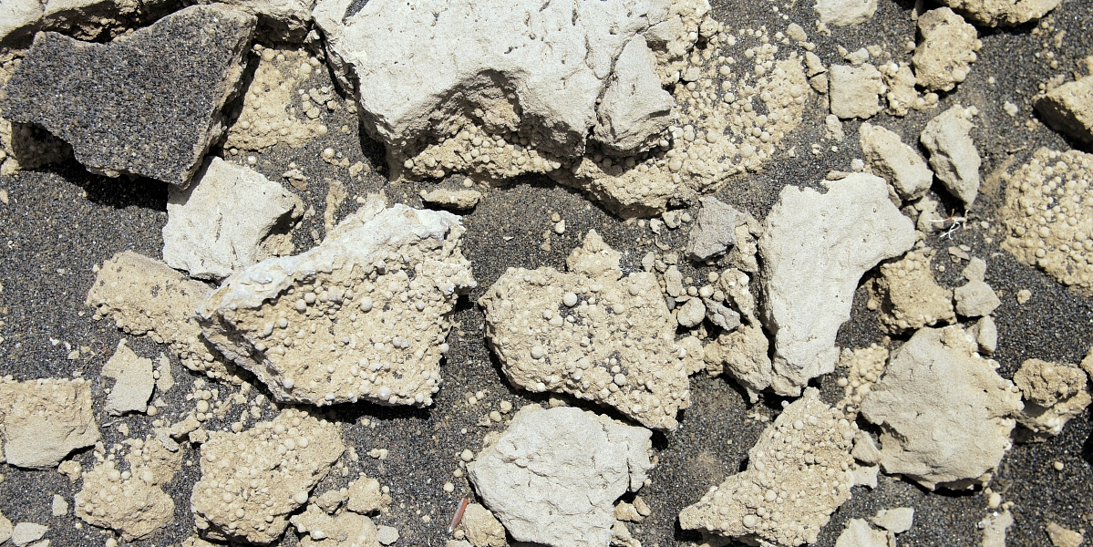 Остров Гвайи. Иллюстрация Второва И.П. для учебника Гавайеведение.